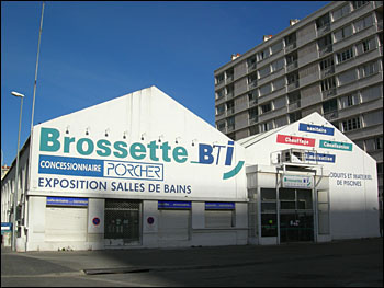 Vestiges: 2 derniers anciens entrepôts à bois de l'arsenal nord du Mourillon.